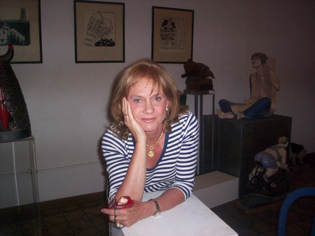 Es una foto de Vivian magis, escultora mendocina contemporánea